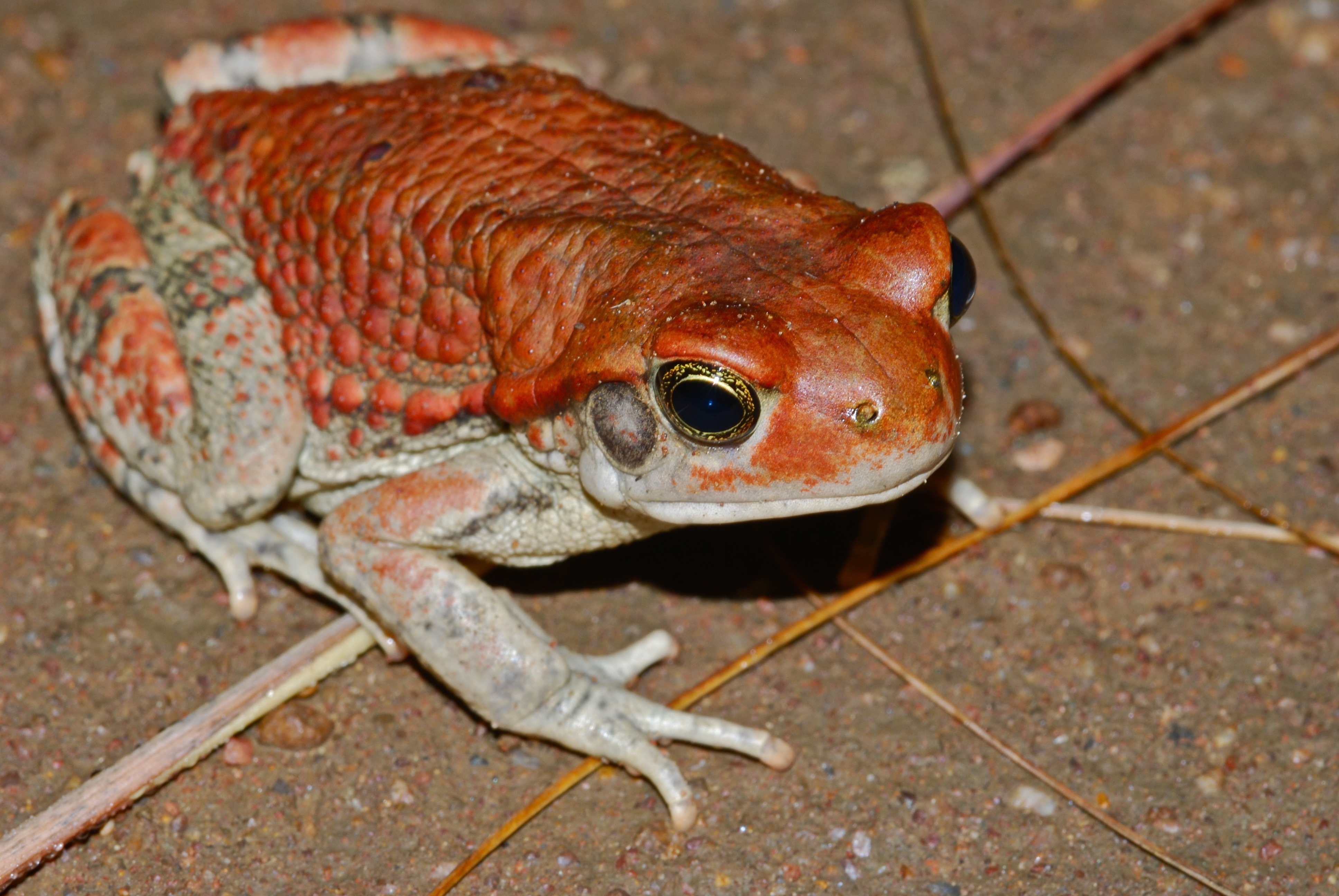 Manyane Resort Walking Trail, Pilanesberg, SOUTH AFRICA